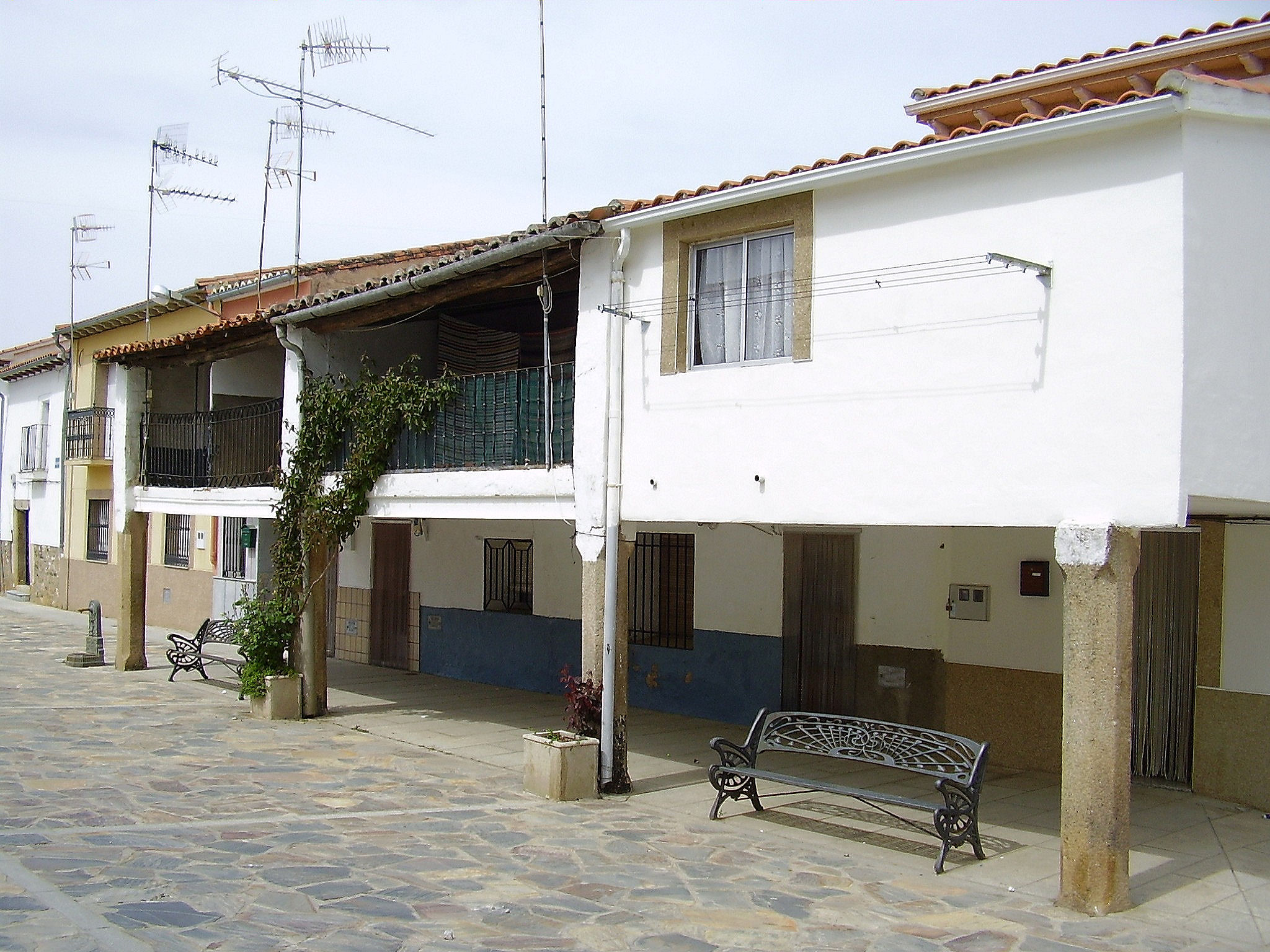 Casas típicas en Villa del Campo, provincia de Cáceres, España.